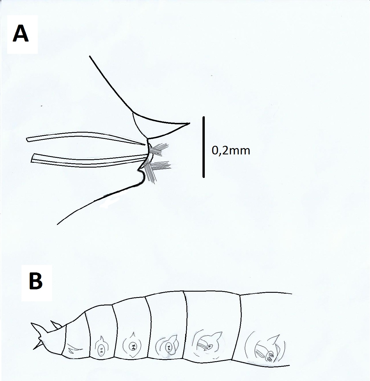 anotnbruunidae